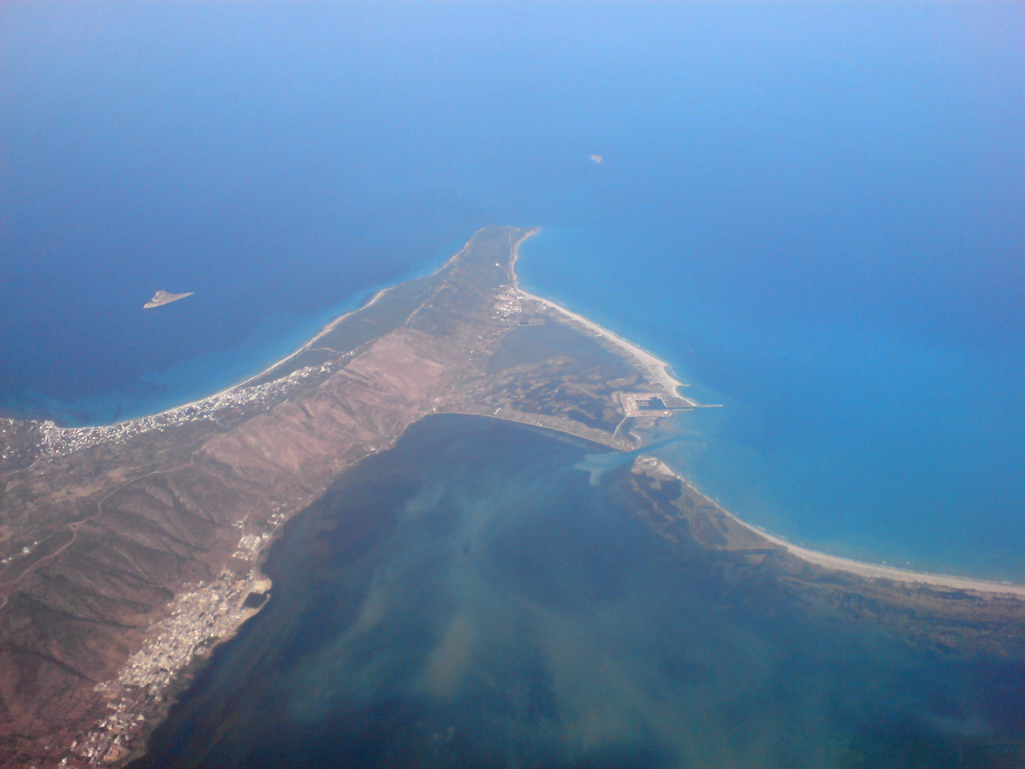 Ghar El Melh (au premier plan), le cap Sidi Ali El Mekki et la petite île Plane avec, à gauche, Raf Raf et l'île Pilau